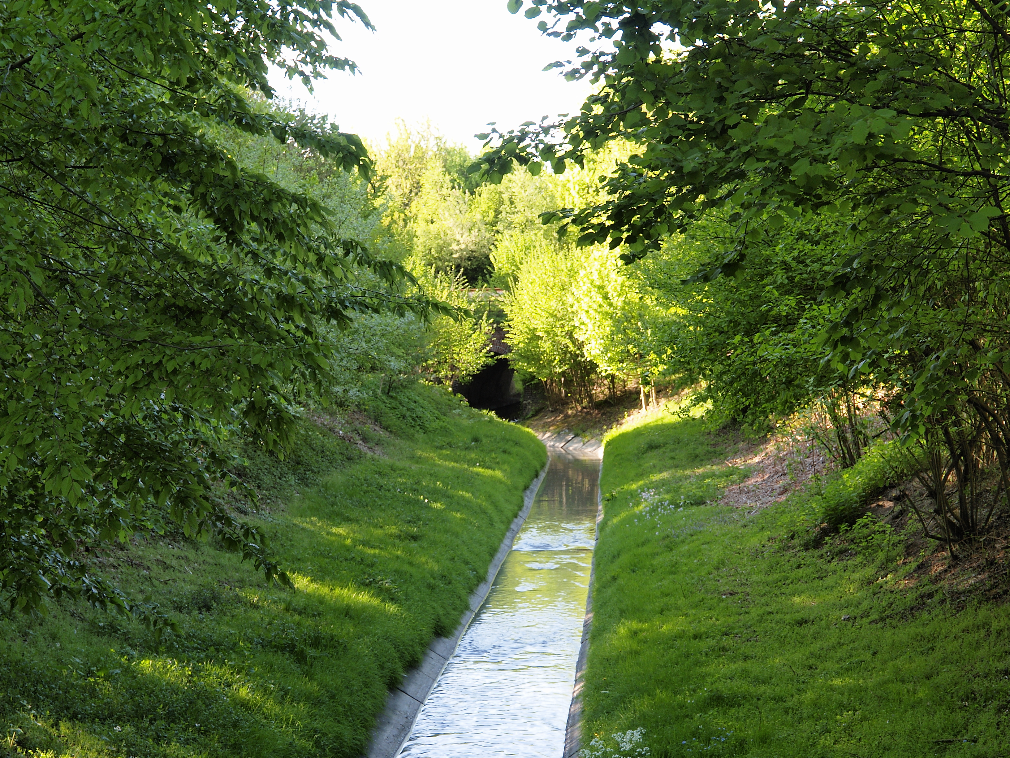 Der Landwehrbach in Castrop-Rauxel vor dem Durchlass unter der Emschertal-Bahn.